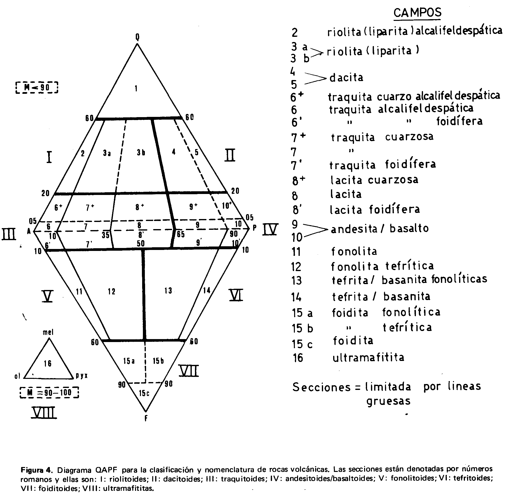 Diagrama QAPF de Clasificación de Rocas Igneas Extrusivas